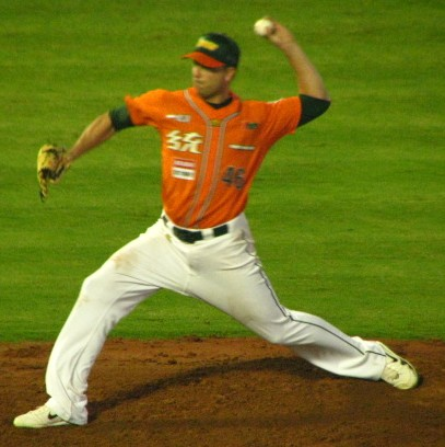 Tyler Ryan Lumsden in 2013